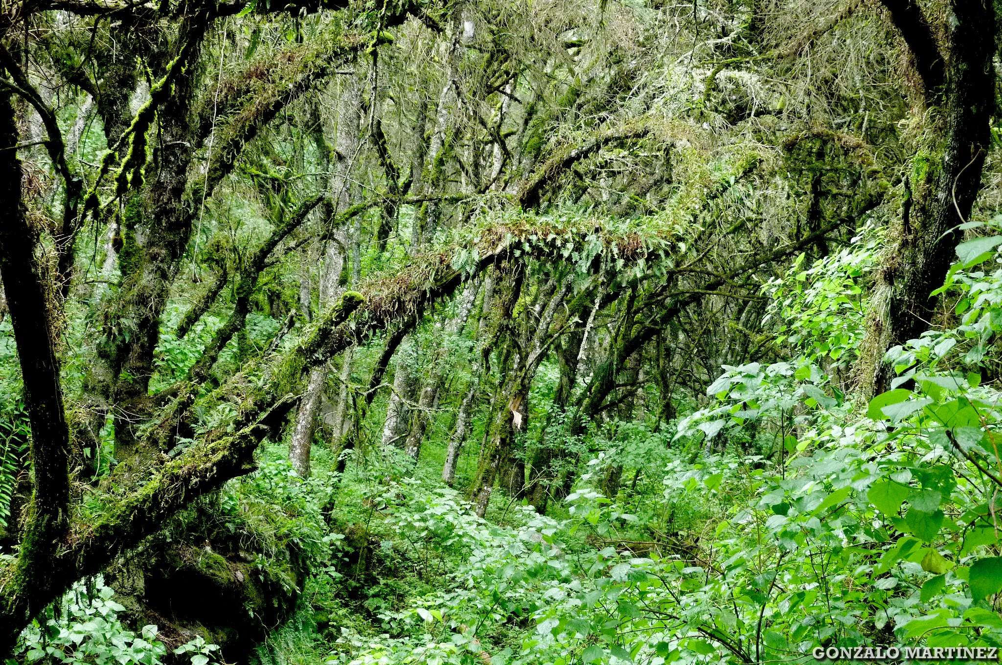 Bosque montano de las Yungas en la provincia de Catamarca, Argentina. Foto: Gonzalo Martínez